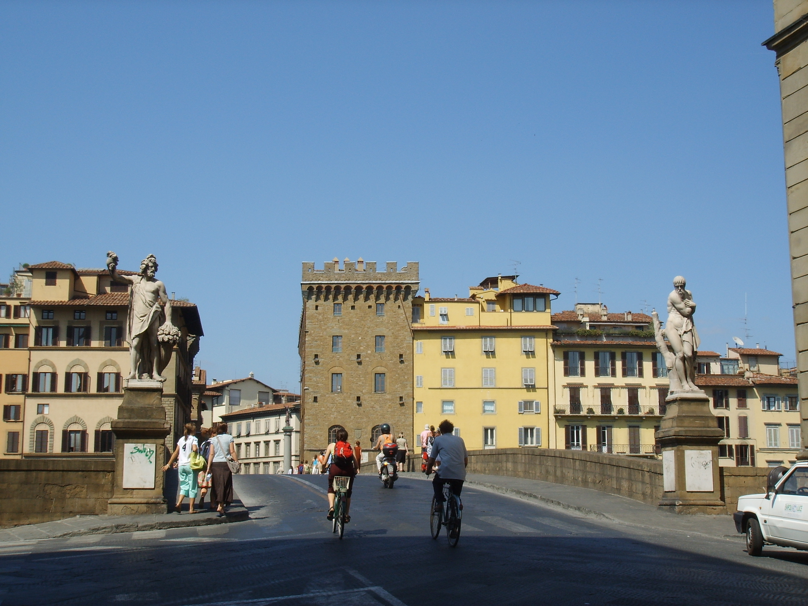 Ponte Santa Trinita (Florence), Italy. Sulla destra il Palazzo Spini Feroni.